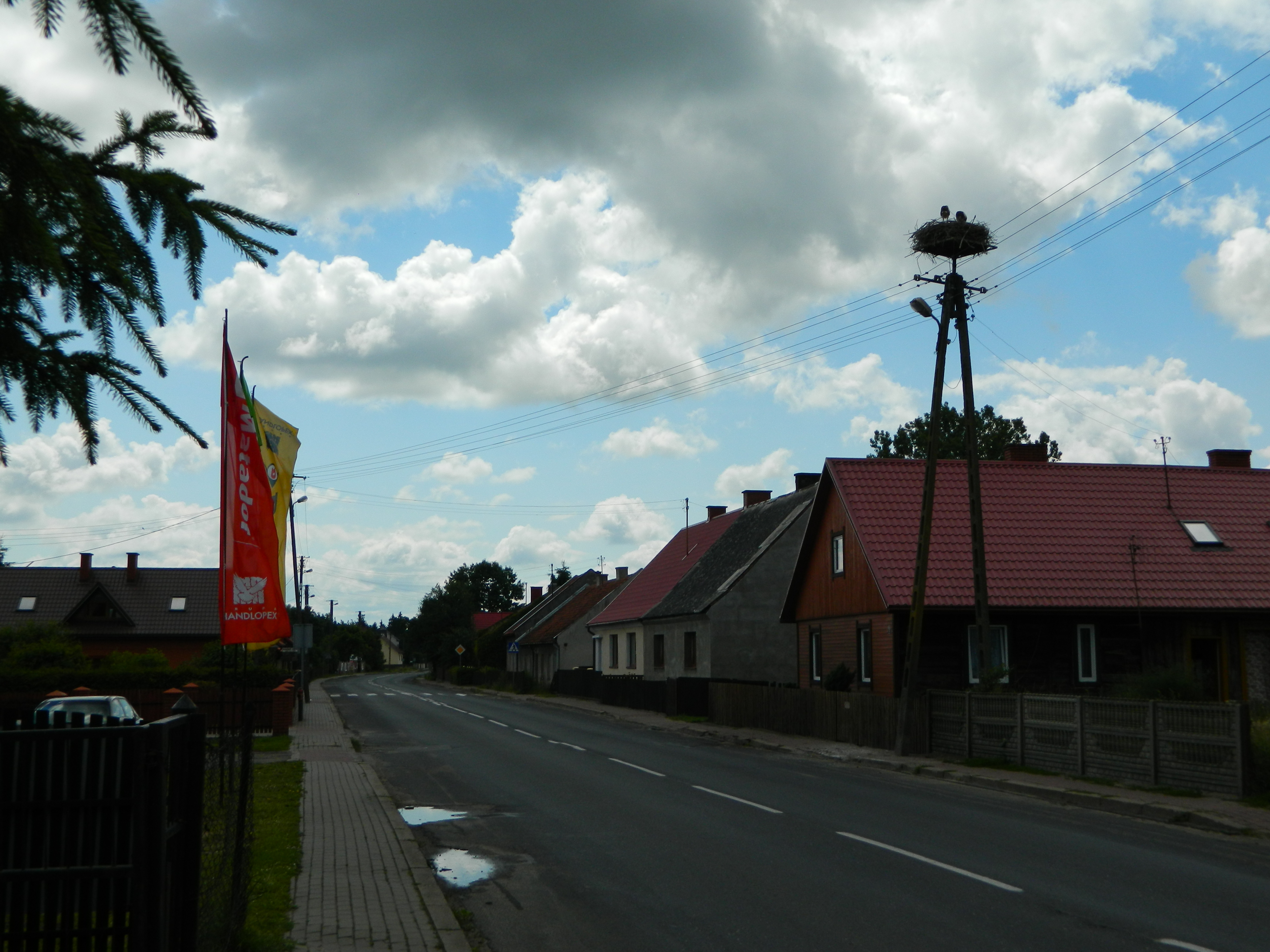 Bocianie gniazdo, Rozogi, 24 stycznia 10